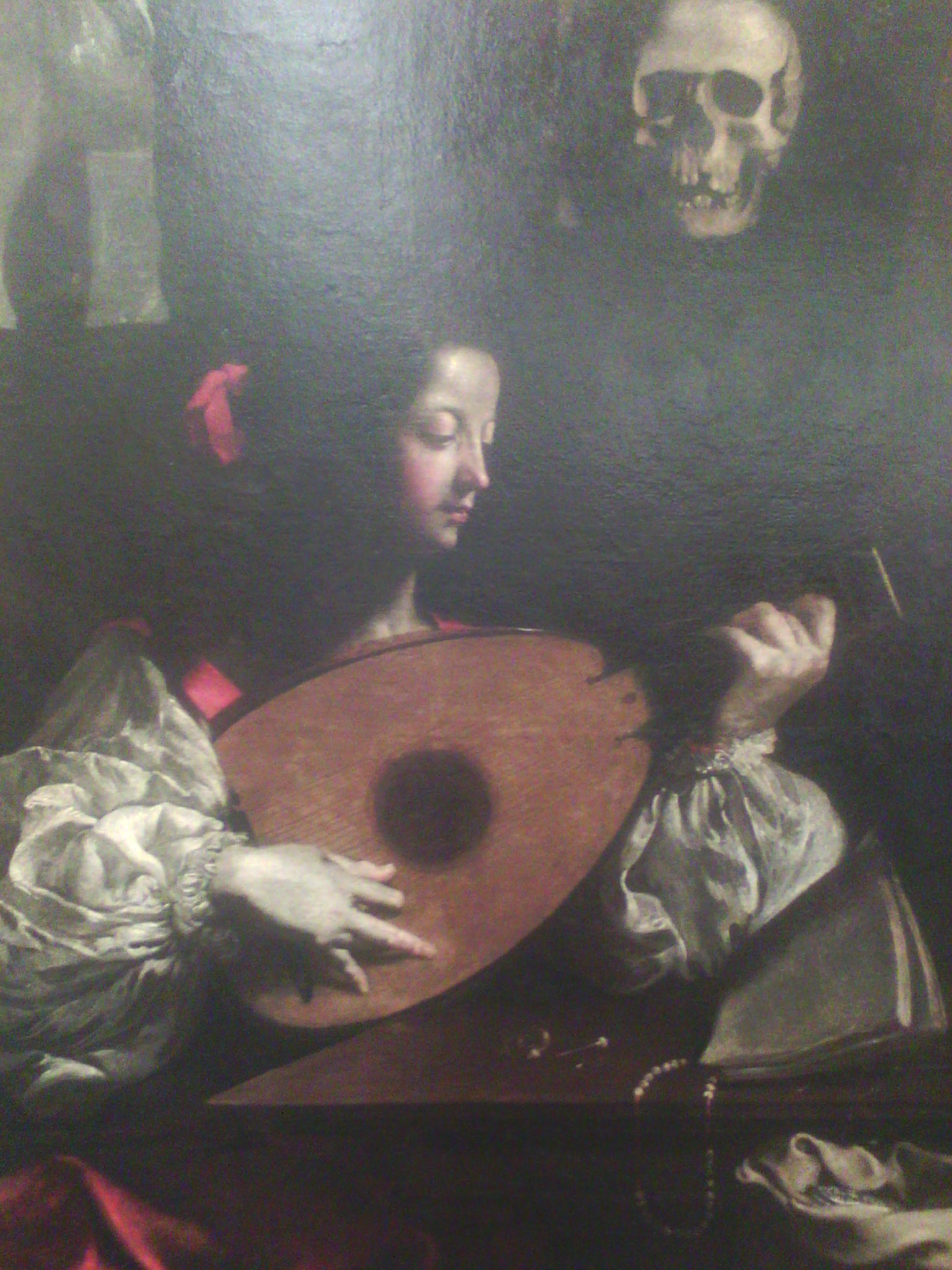 "Suonatrice di liuto" di Luigi Miradori, opera esposta presso la galleria d'arte di palazzo Bianco